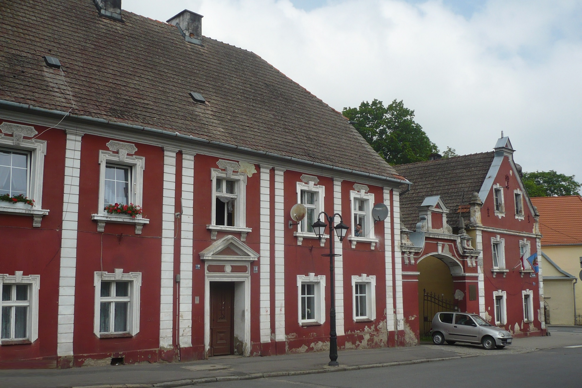 Kamienica w Złotym Stoku